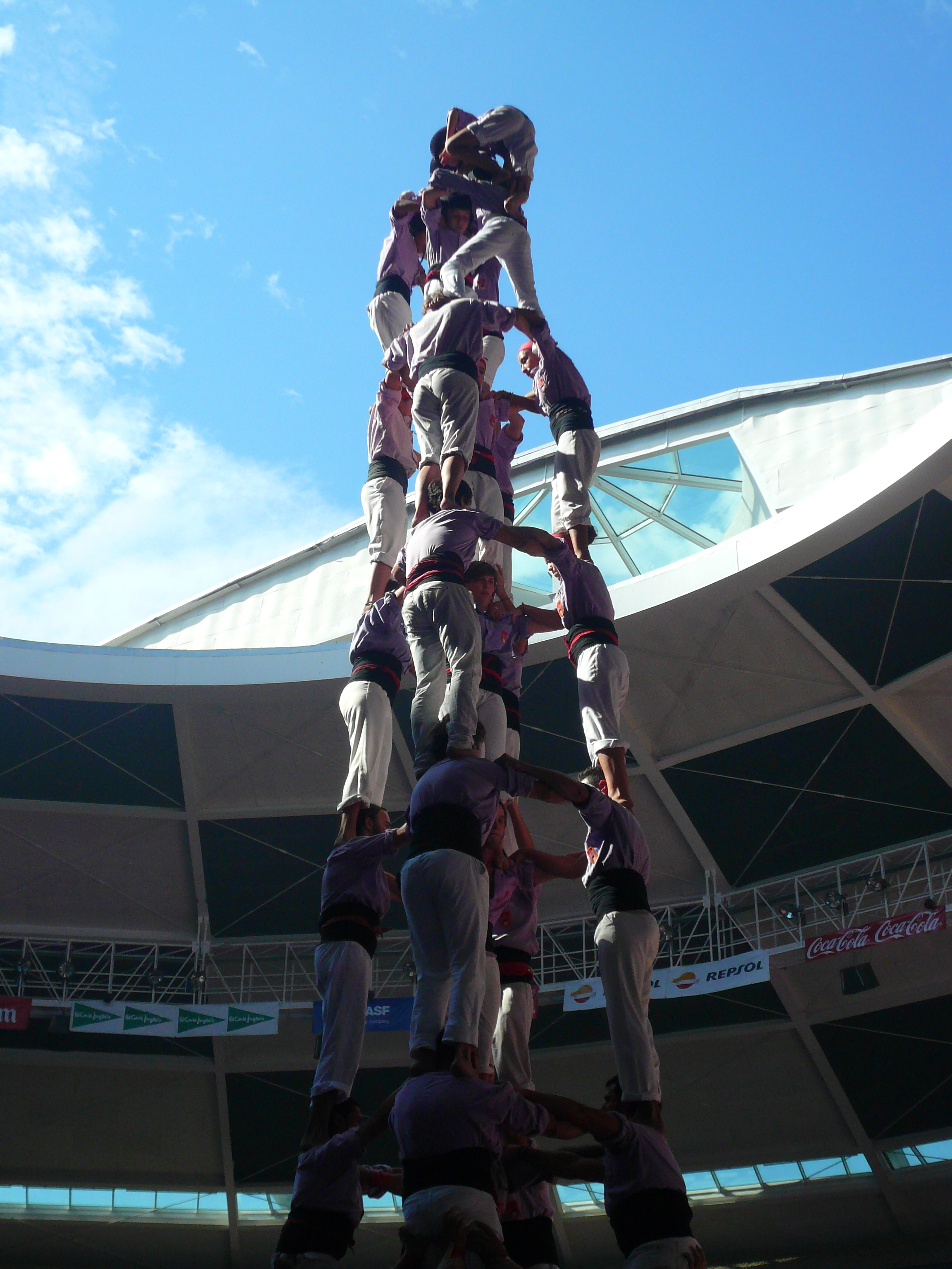 Concurs de Castells de Tarragona 2012, a la Plaça de Toros, o Plaça de Braus. c/ Eivissa - c/ Jaume I - c/ Mallorca (Tarragona). Object location41° 06′ 51.64″ N, 1° 14′ 43.03″ E